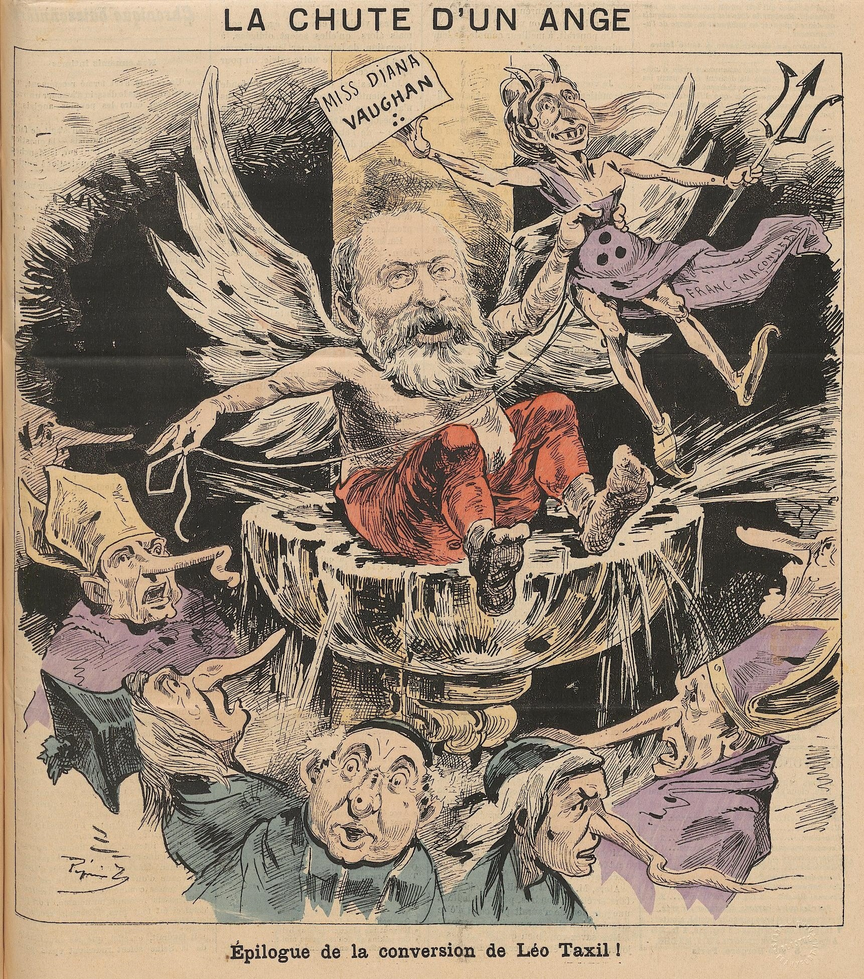 "La Chute d'un ange".